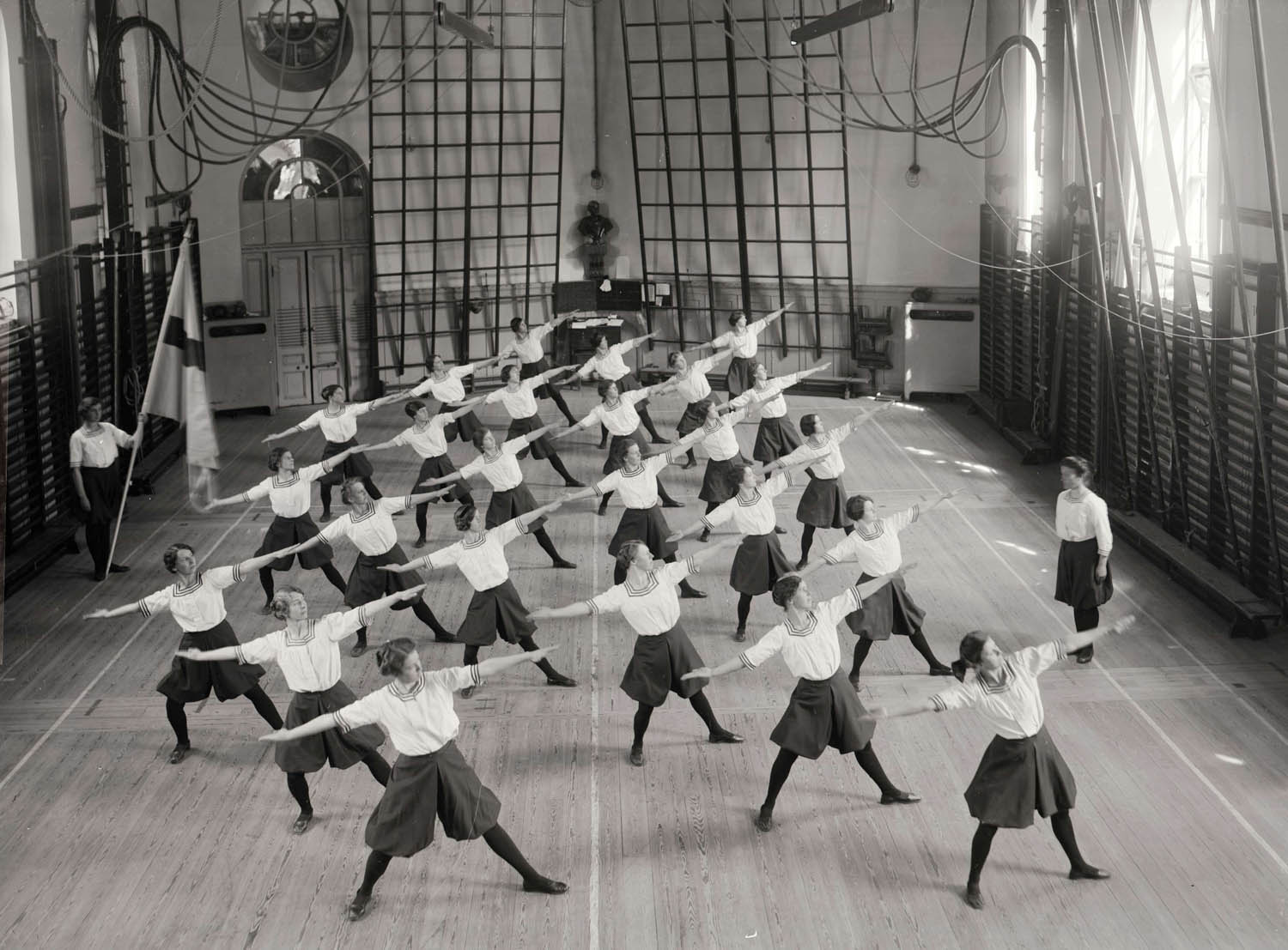 Damgymnastik. Gymnastiska centralinstitutet, Hamngatan 19, Norrmalm, Stockholm..